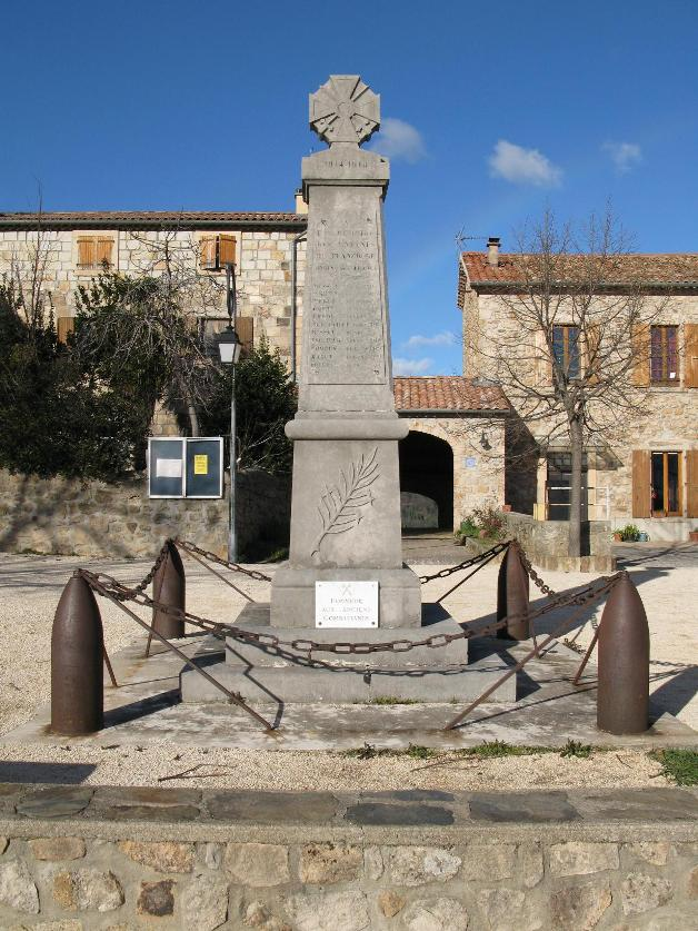 Monument aux morts de Planzolles